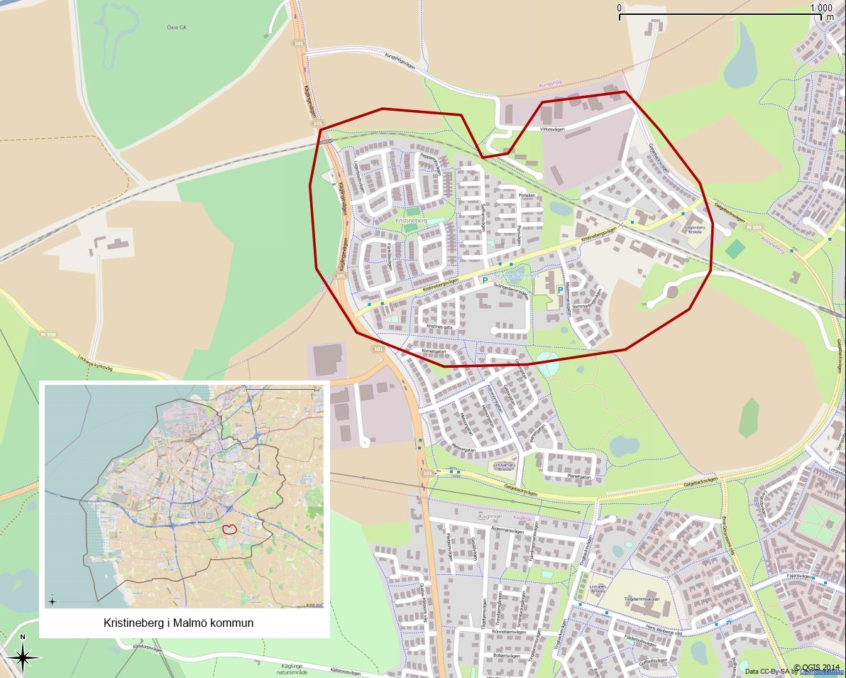 Tätorten Kristinebergs gränser 1990 enligt Atlas över rikets indelningar 1992.